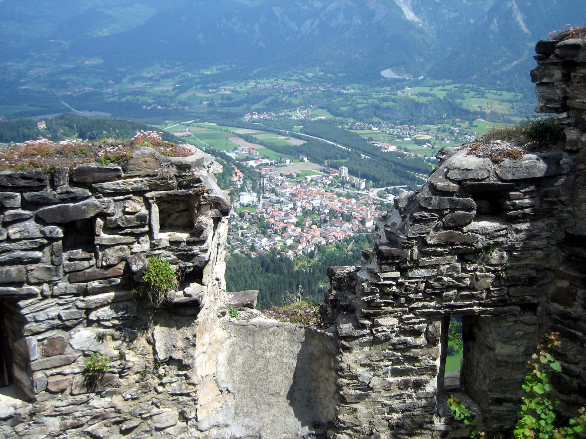 Sicht nach Thusis